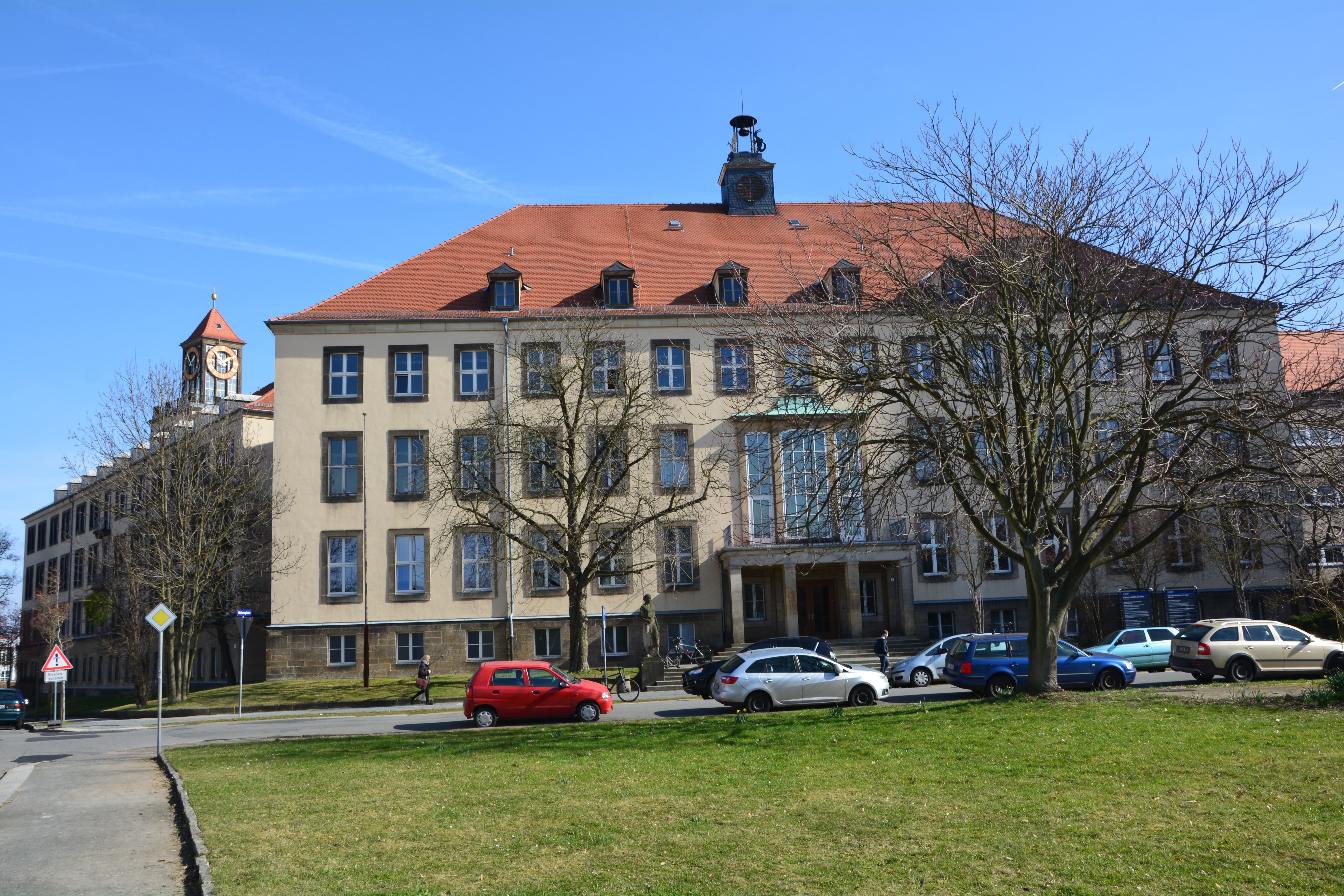 Dresden,TU-Gebäude am Weberplatz, Königliches Lehrerseminar - Arbeiter -und Bauernfakultät heute Erziehungswissenschaftliche Faklutät am Weberplatz. Wsetflügel